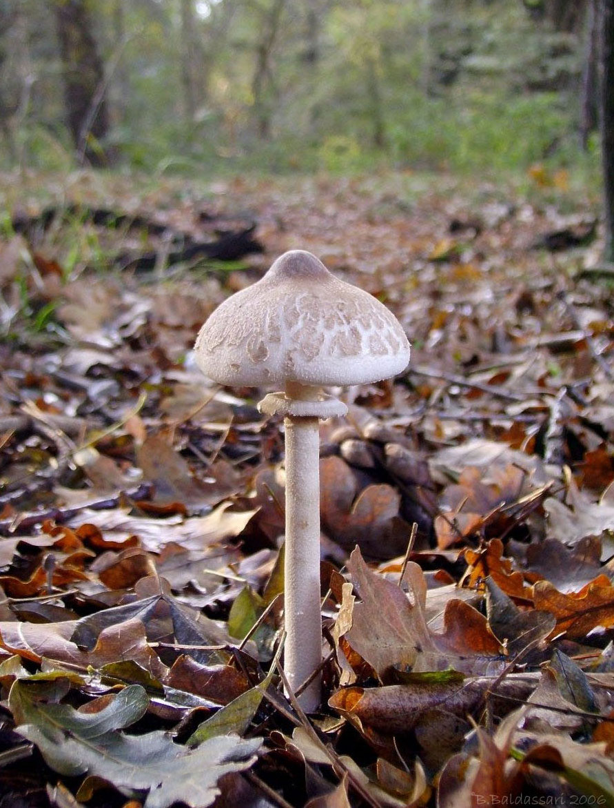 Macrolepiota mastoidea - S.Rossore (PI) - 10/2006